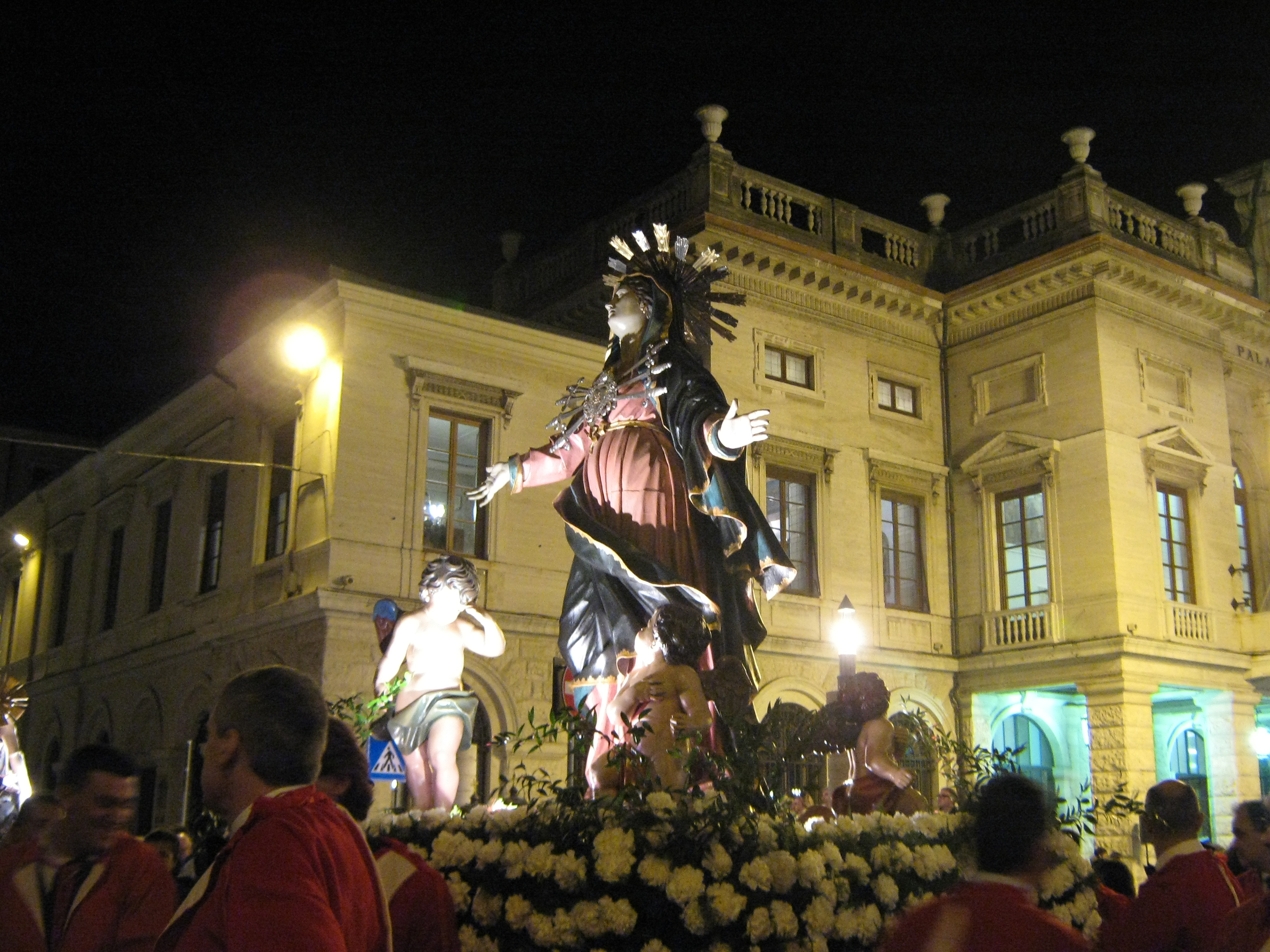 Cassa processionale in legno policromo L'Addolorata, Filippo Martinengo fine del sec. XVIII. Misure: 180x160x145cm. Arciconfraternita della SS. Trinità, presso la chiesa parrocchiale di S. Rita. Processione del Venerdì Santo di Savona 2010.